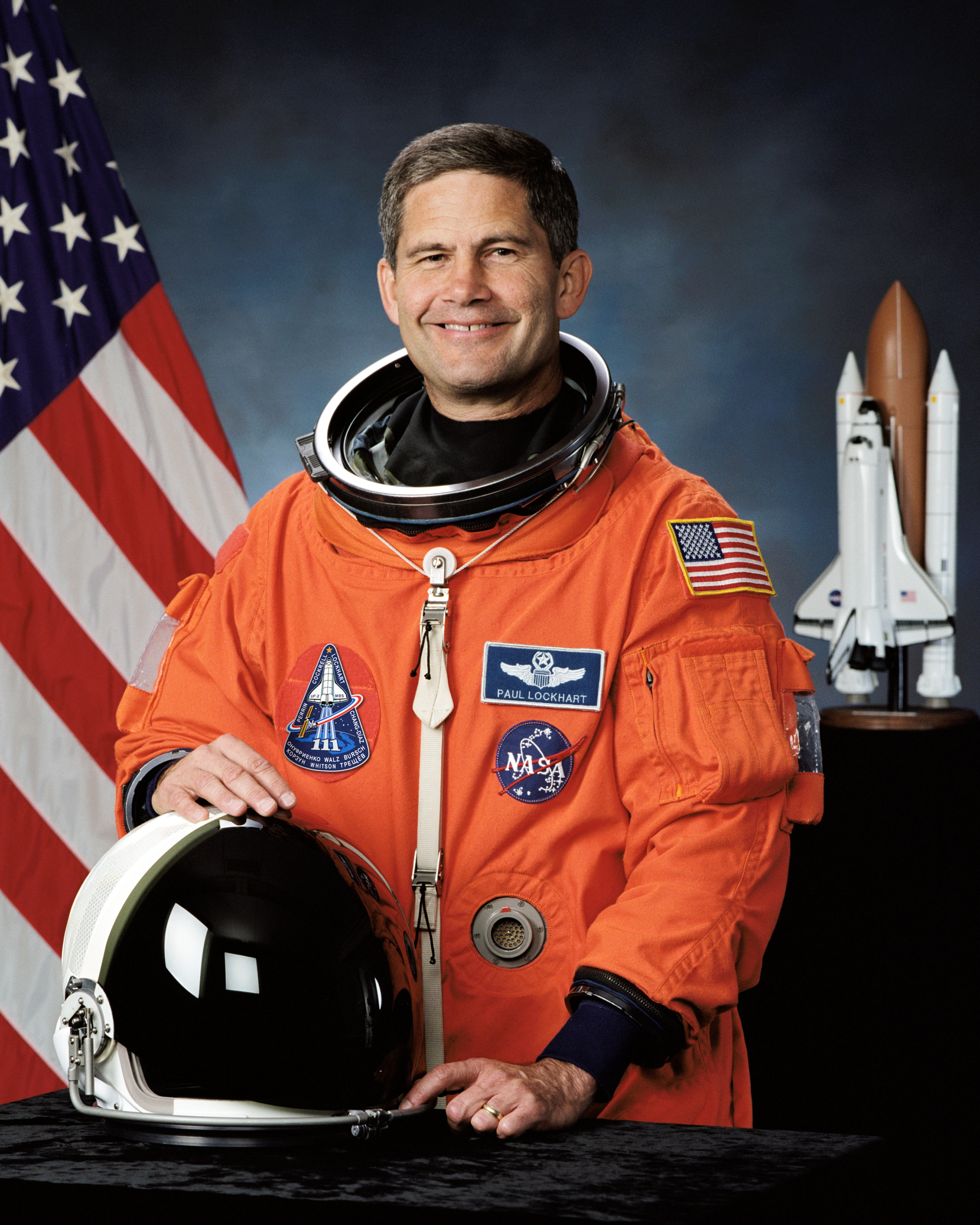 portrait astronaut Paul Lockhart